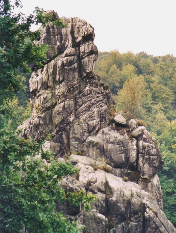 Blick auf den höchsten Einzelfelsen der Externsteine